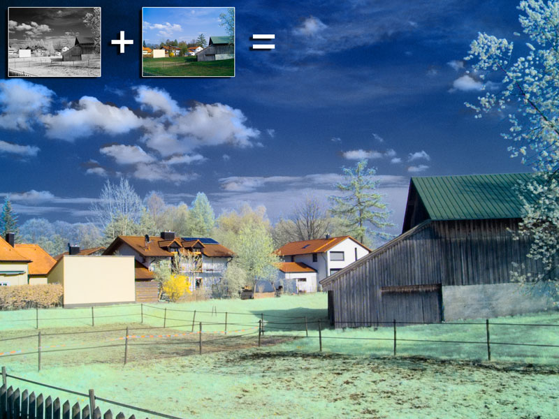 850nm-es szűrővel készült infra kép, melyre egy hagyományos fotó színei lettek átültetve (helyszín: Unterhaching, Németország)